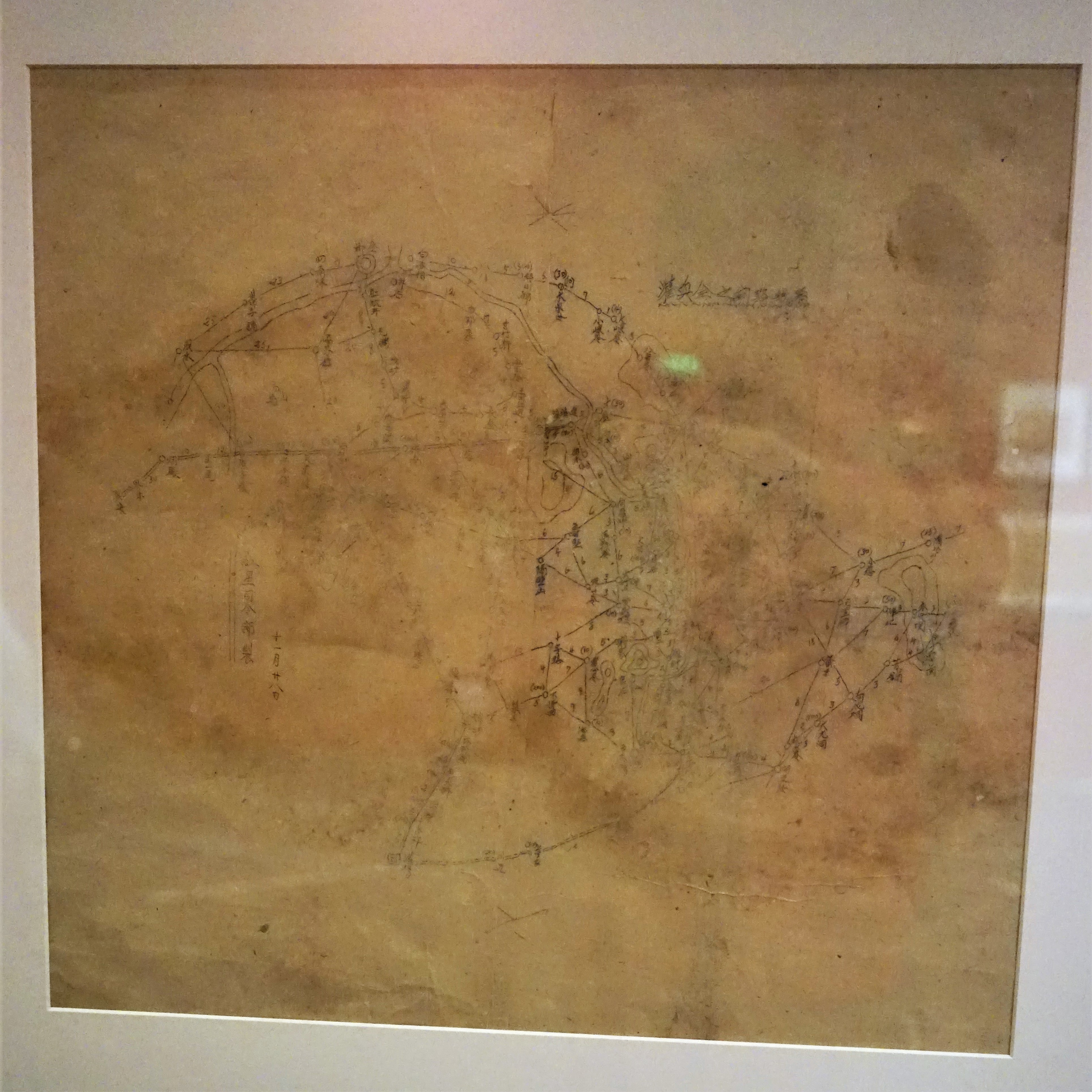 1934年11月底，中央红军战斗五天，从湘江上游全州、兴安之间抢渡湘江，突破了国民党军的封锁线。这是中国工农红军红星司令部为抢渡湘江绘制的《灌（阳）兴（安）全（州）之间的路线图》